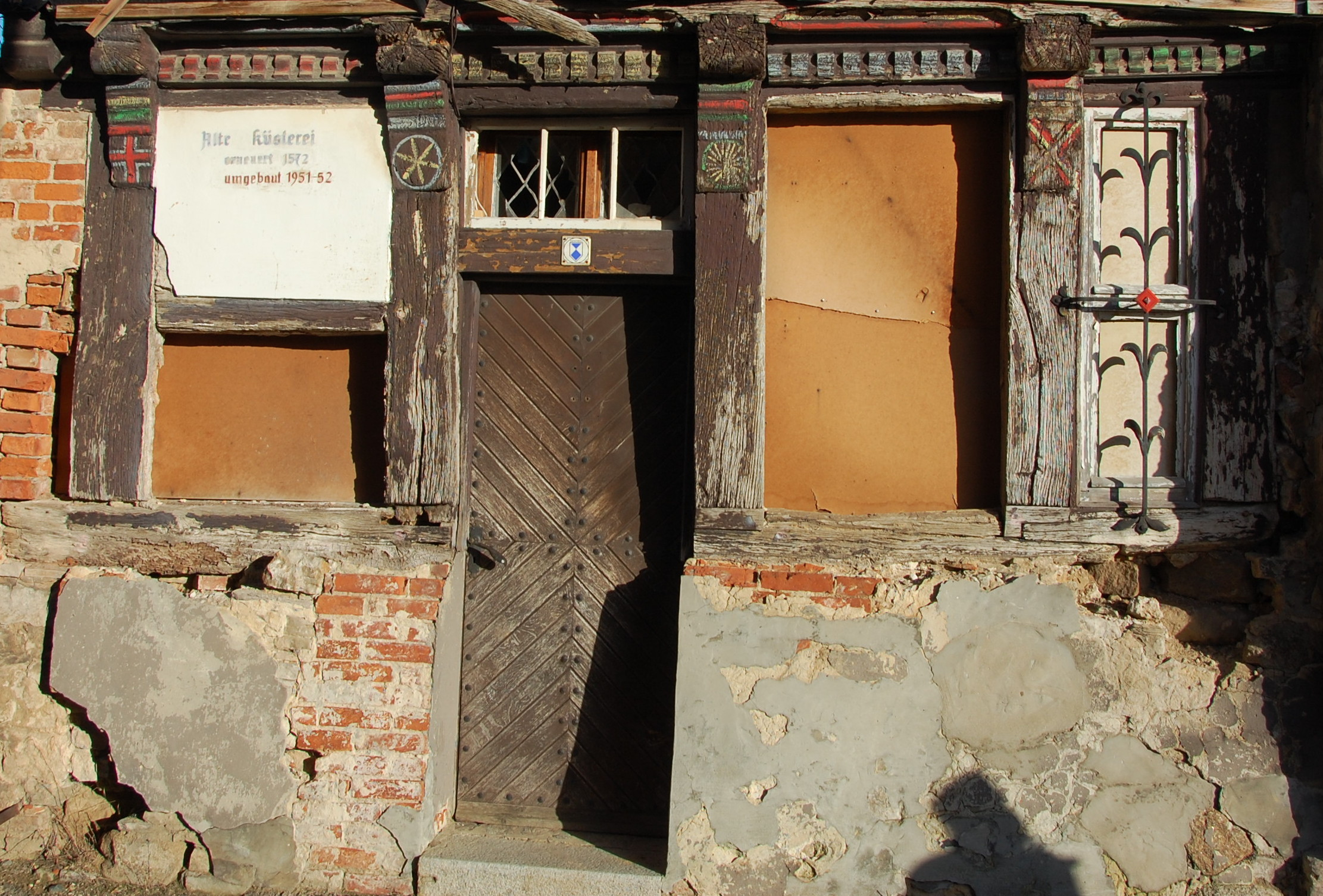 Haus Bergstraße 3 in Gernrode